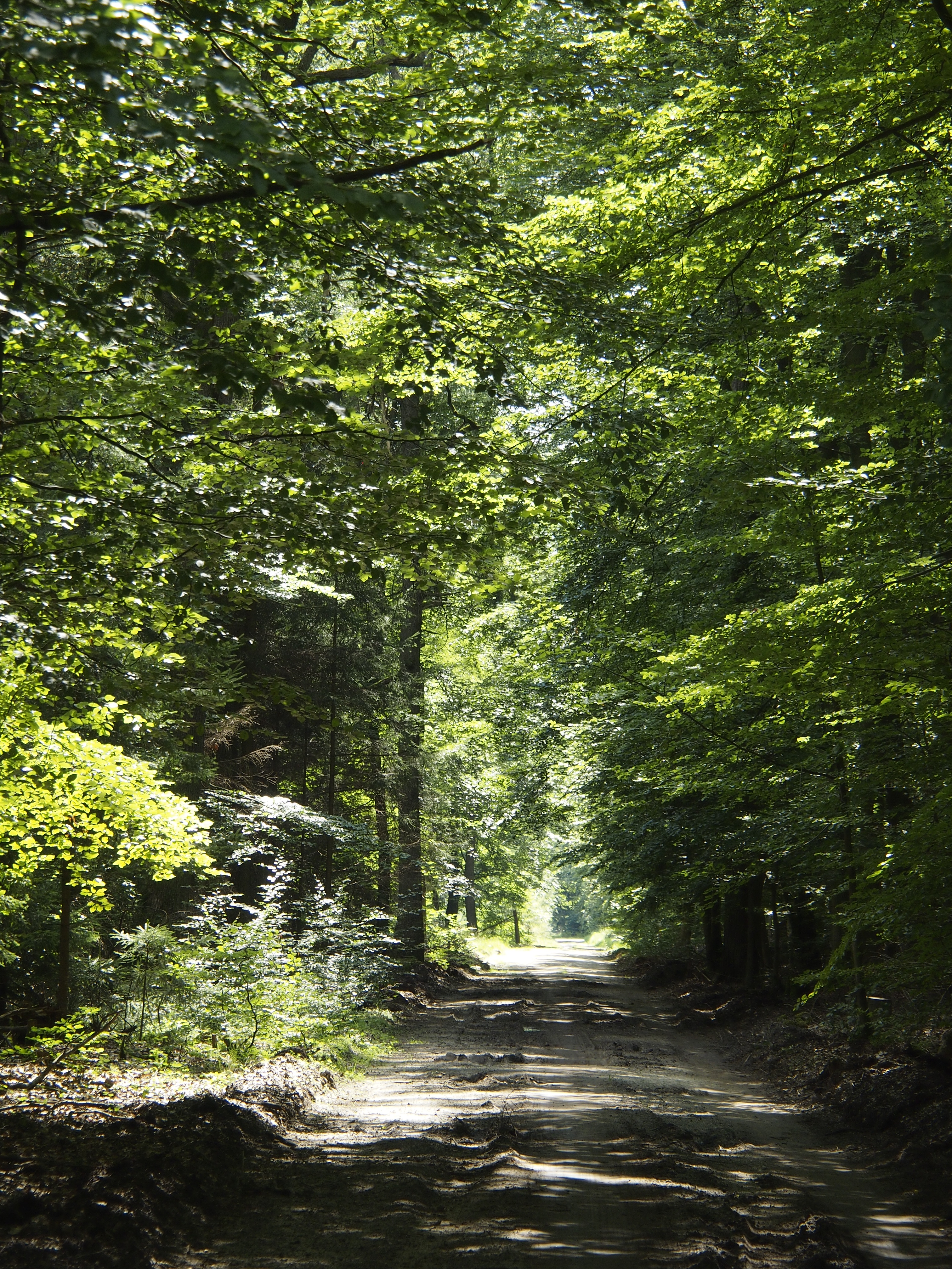 Buchenwald-Weg an der L 280 zwischen Unterlüß und Eschede-Weyhausen